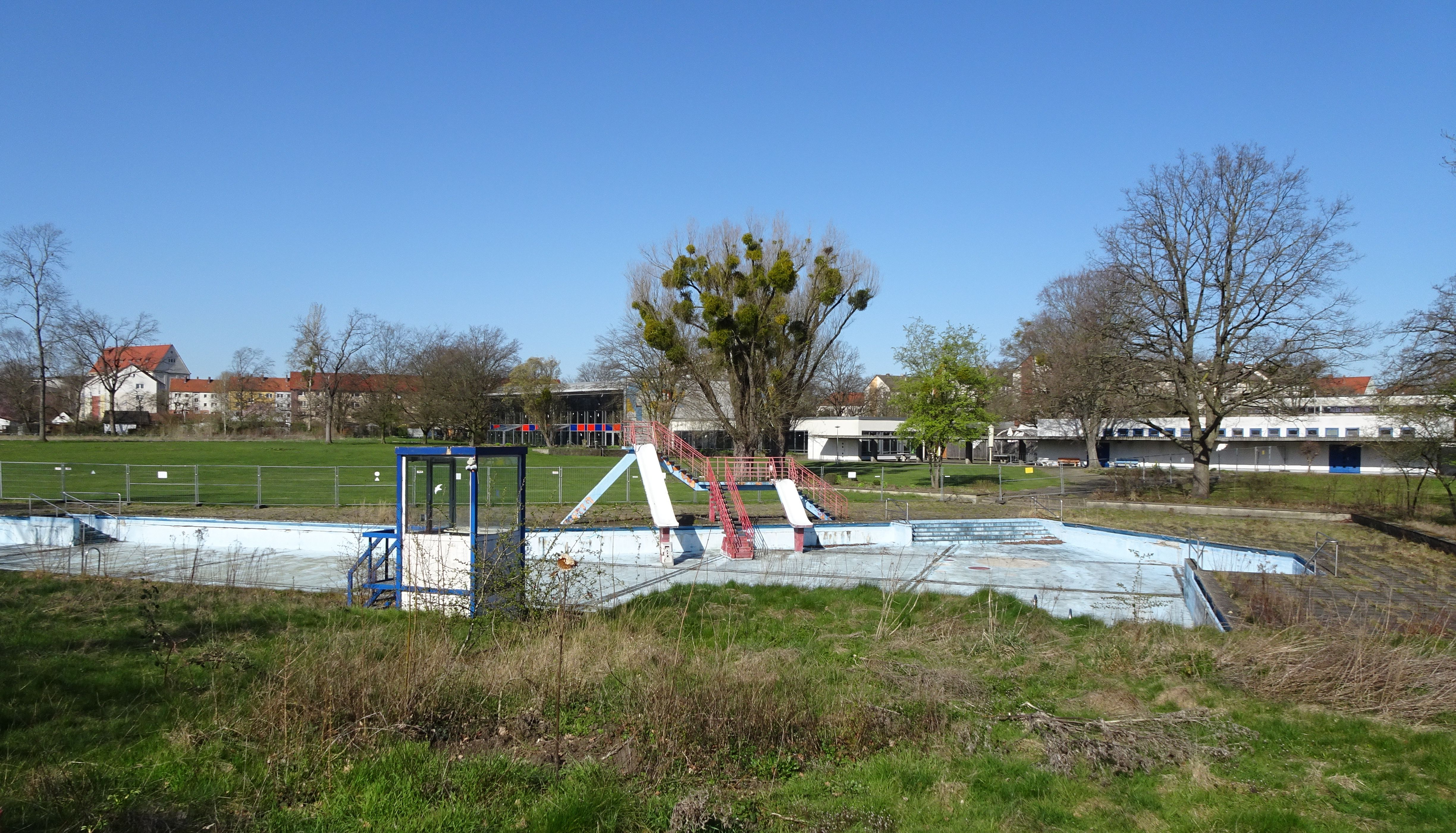 Fössebad Hannover, Blick von Süden